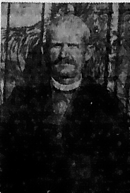 Srpski (latinica): Илија Илић солунски добровољац